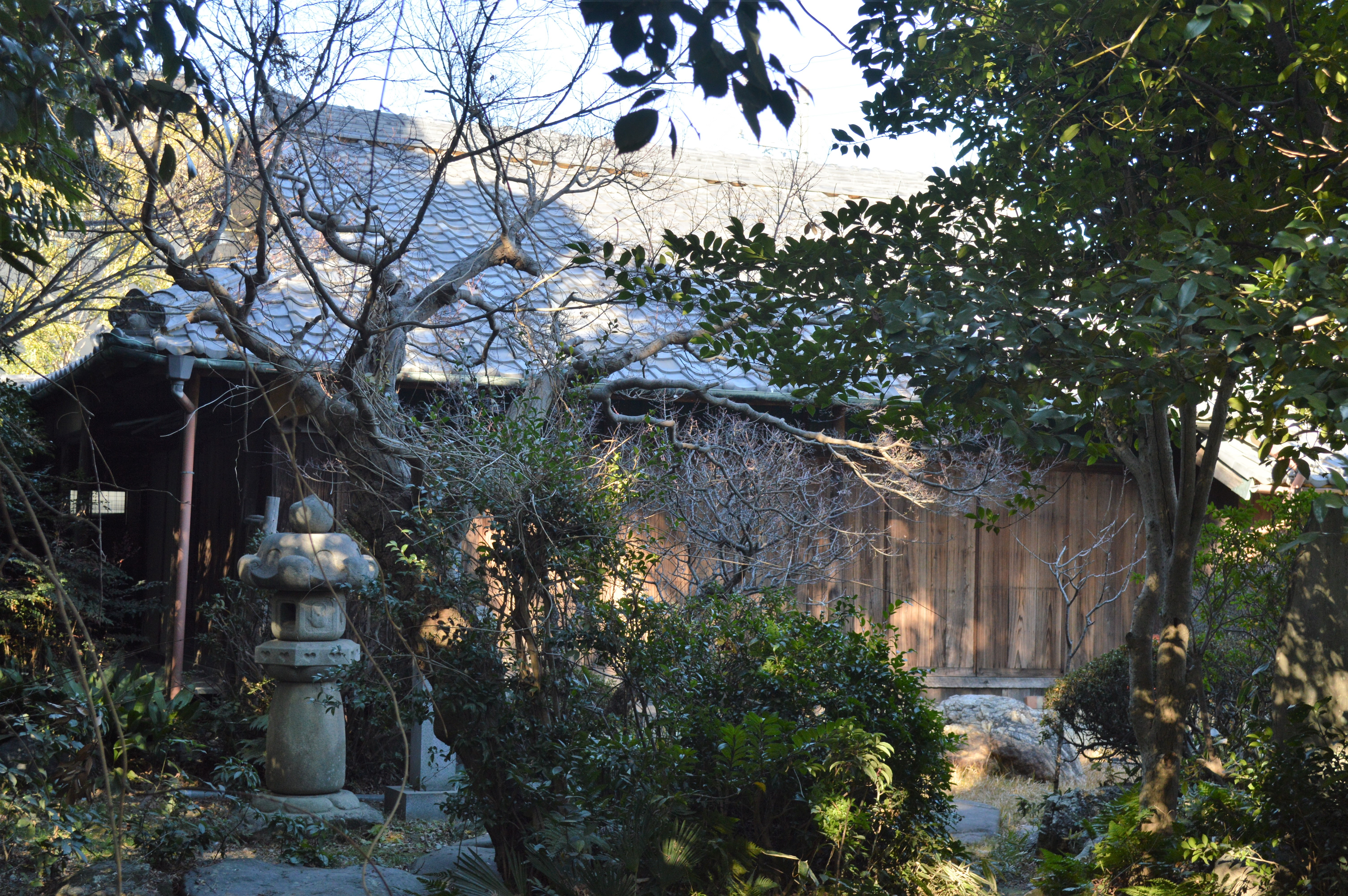 愛知県豊橋市にある羽田八幡宮。羽田八幡宮社務所離れ（旧羽田野家住宅主屋）。登録有形文化財。